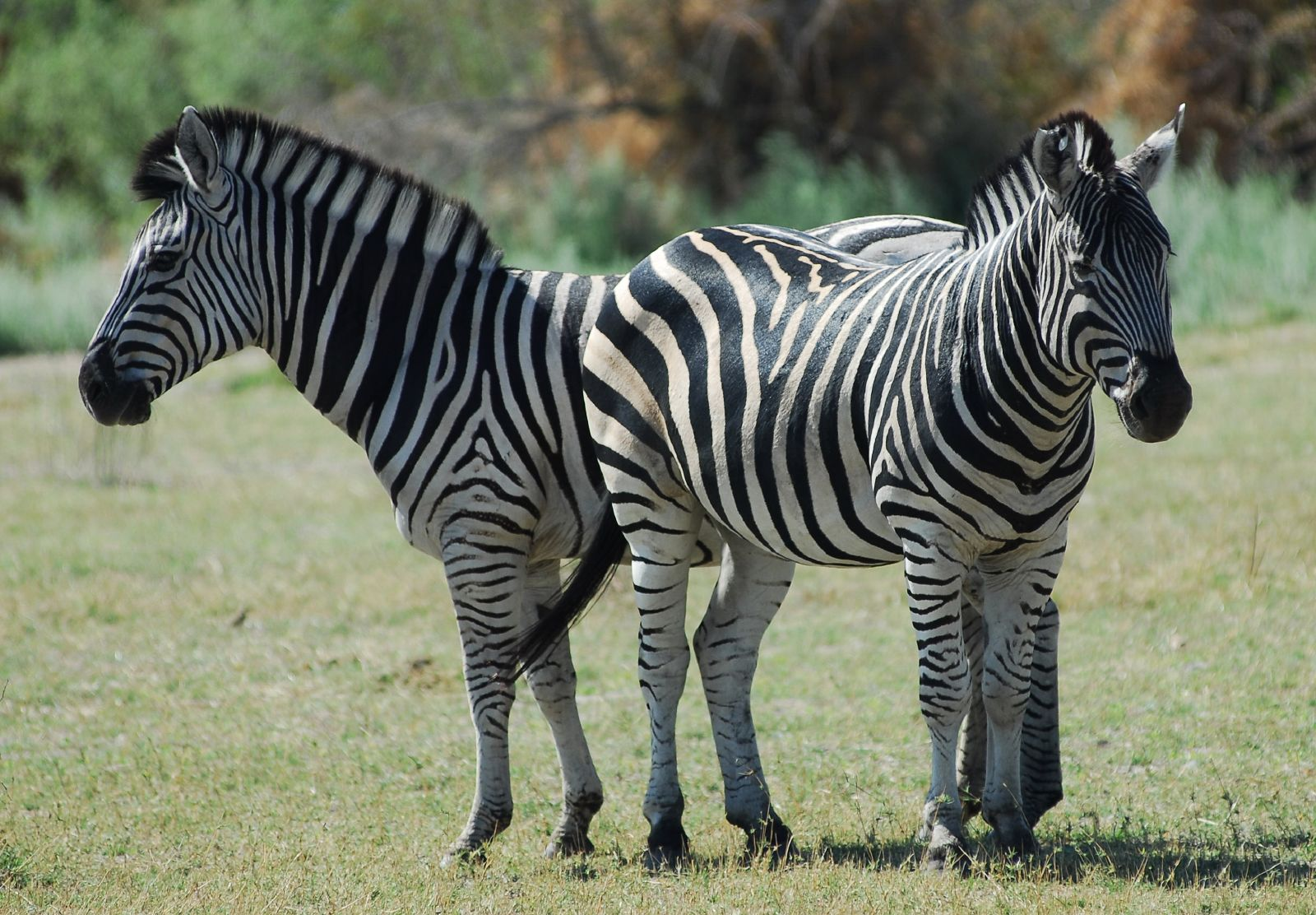 Botswana, Moremi, Okavango